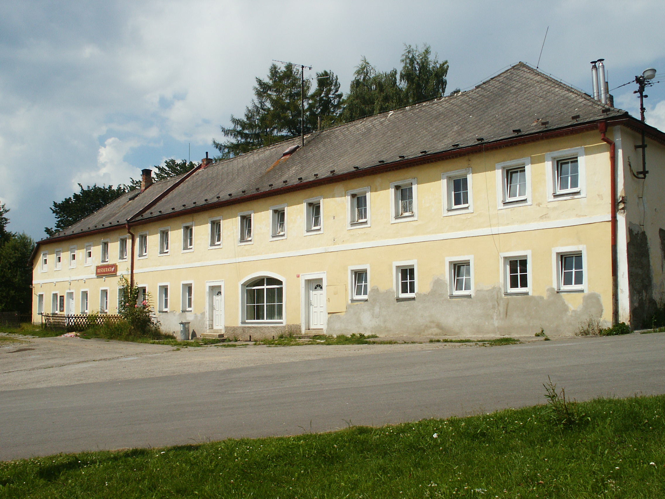 Bližná - restaurace (č.ev. 411)